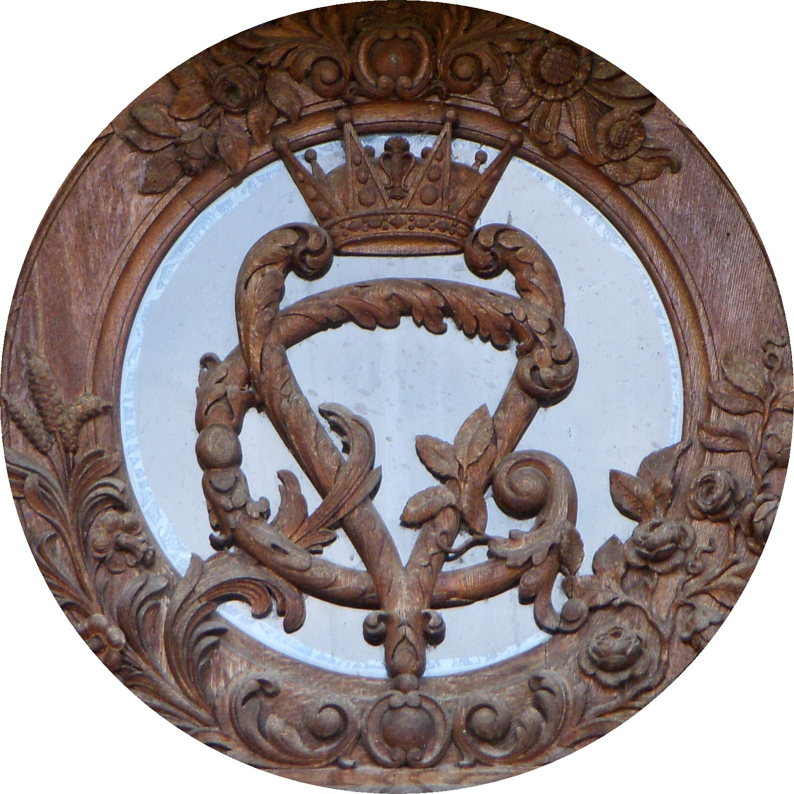 Tullgarns slott, entréportal med Gustaf V:s och Viktorias namnchiffer